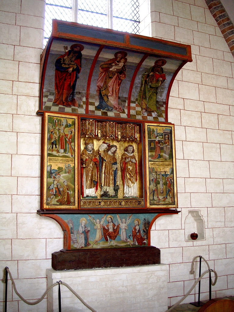 Blasius-Altar in der St. Nikolaikirche in Burg (Fehmarn): Der Altar wurde 1513 errichtet, 1698 mit einem Kirchenstuhl umbaut und 1882 wieder freigelegt. Eine erste gründliche Restaurierung erfolgte 1952/53, die endgültige Ende des 20. Jhs. Die Abbildung zeigt den geöffneten Altar.